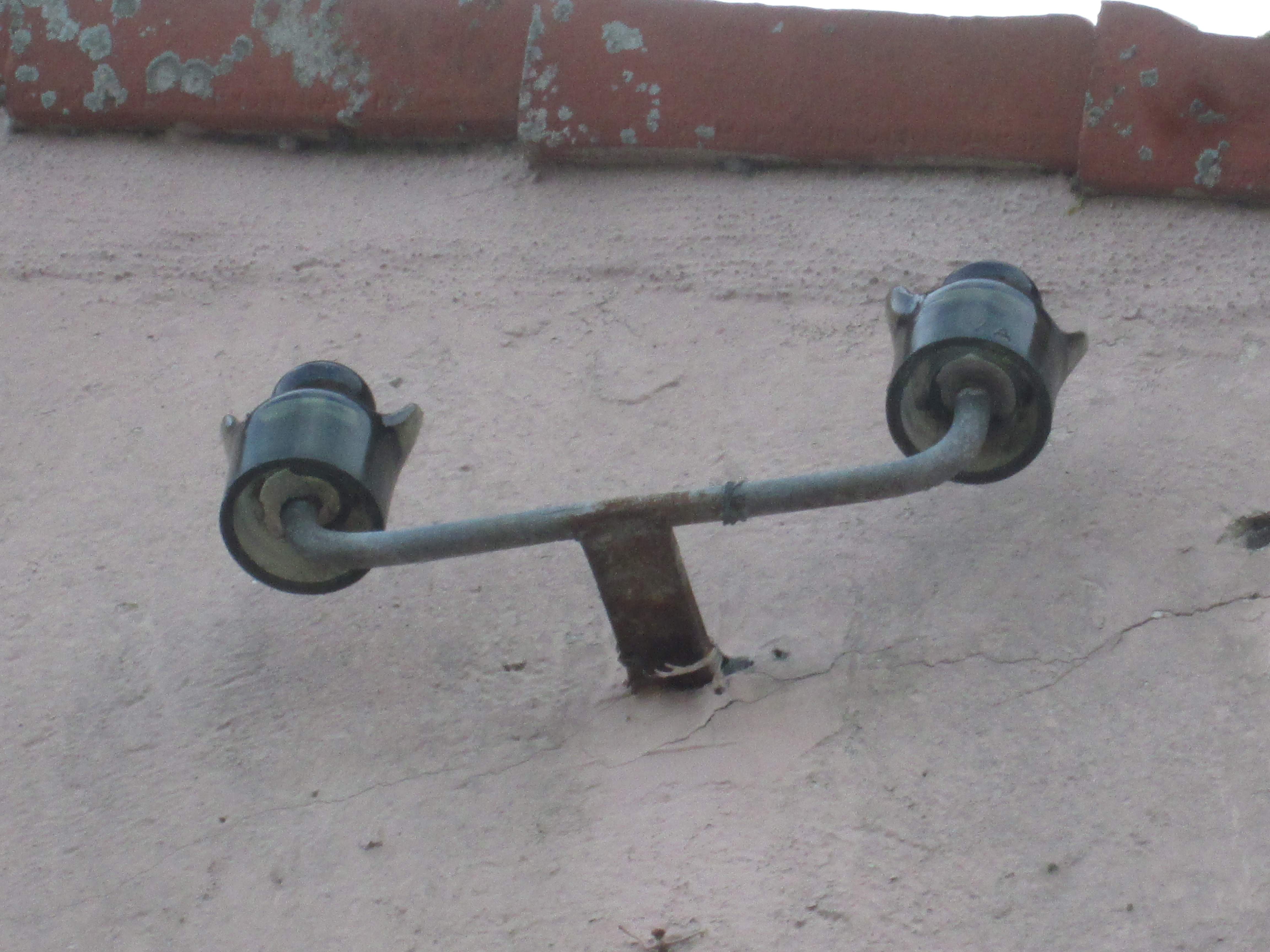 Photographie prise à Champagné les Marais(Vendée) et montrant deux isolateurs téléphoniques de fabrication verrerie d'Albi, qui servaient au branchement d'une ligne téléphonique abonné et qui sont désaffectés.